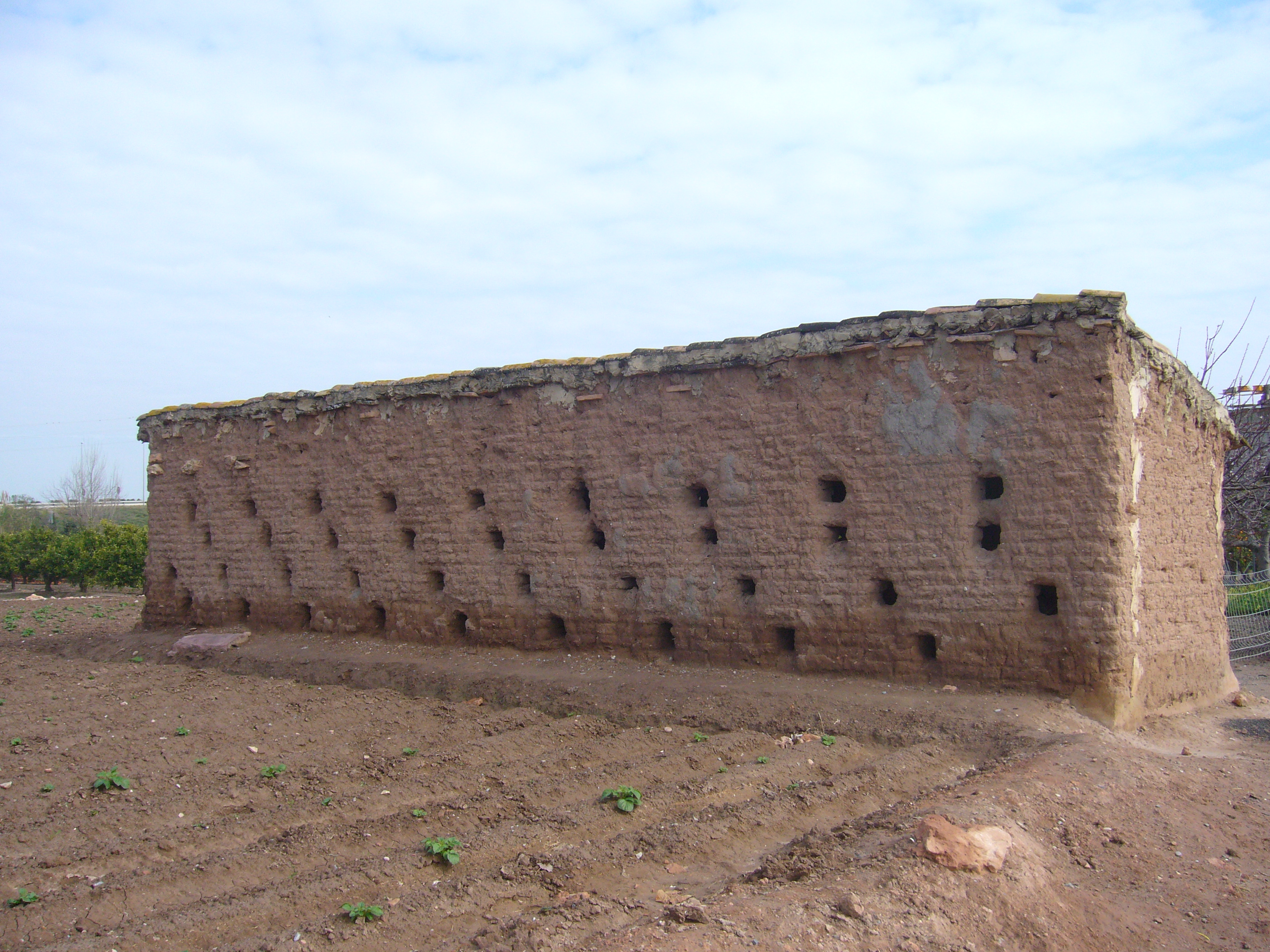 Cebera al camí de l'estació de Massalfassar